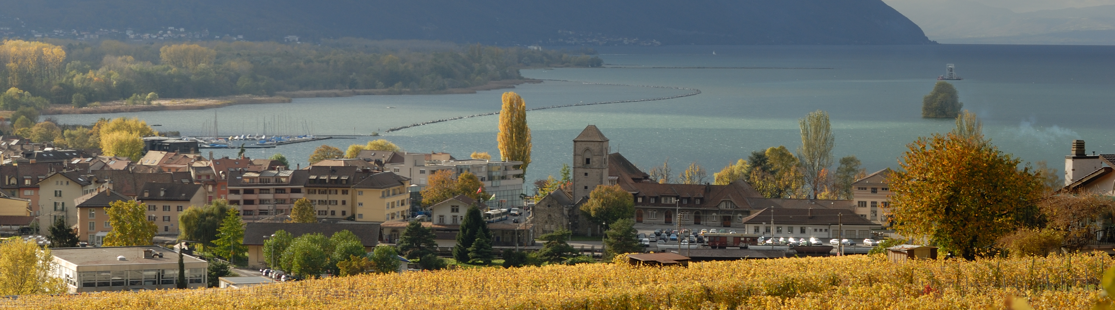 Vue automnale de Villeneuve (VD) depuis les vignes.